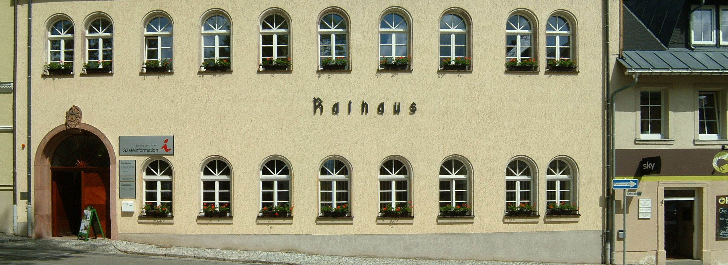 Oberwiesenthal, Rathaus